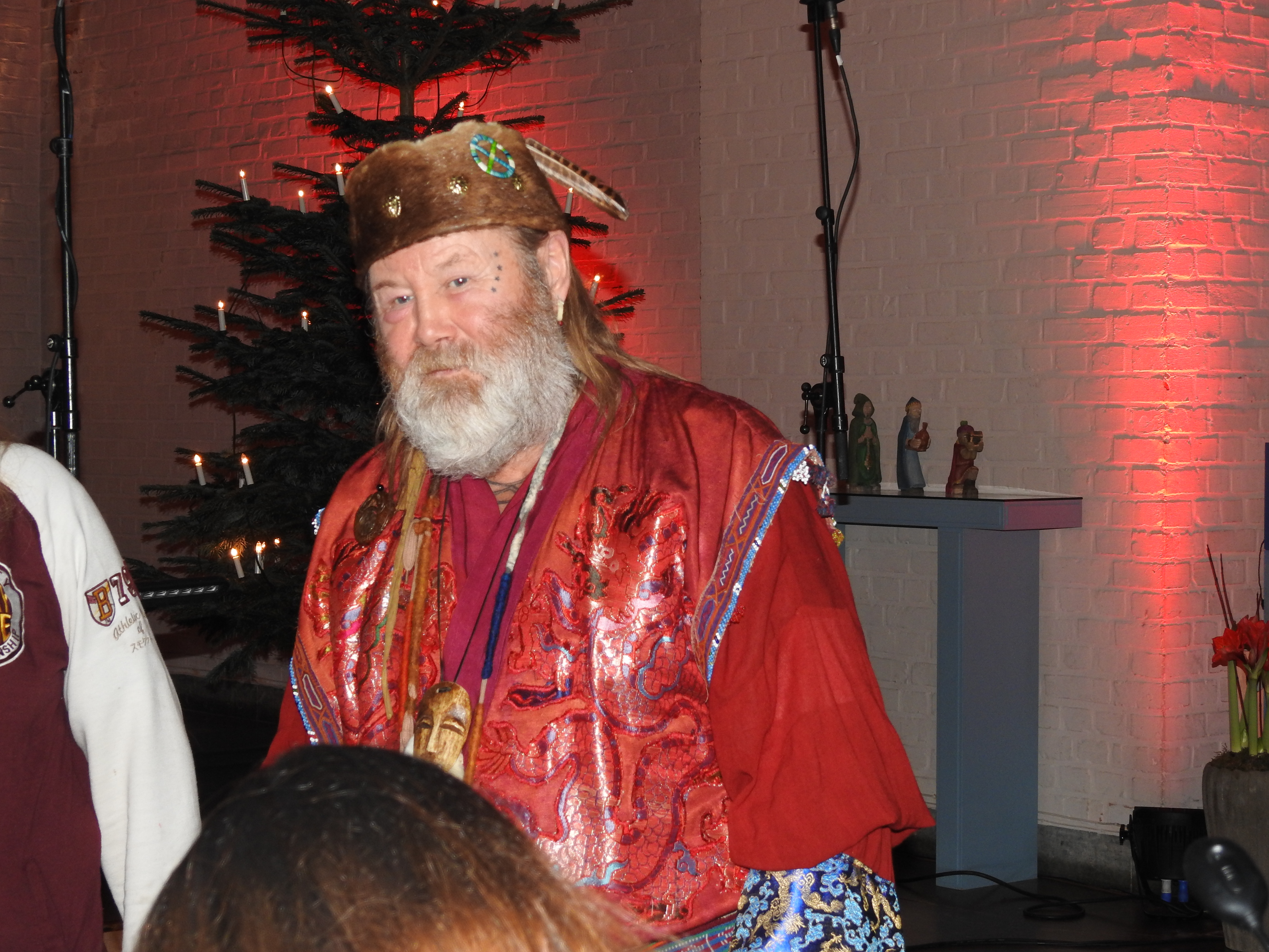 Roger Pontare 15/12-16 (Masthuggskyrkan, Göteborg)